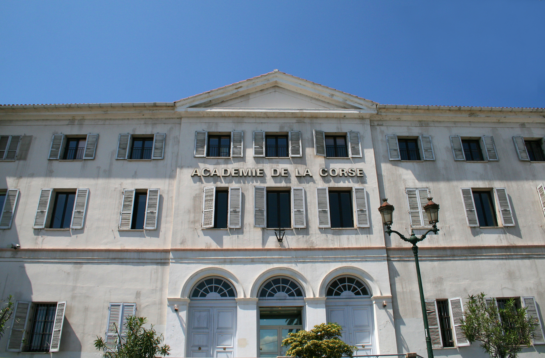 Ajaccio France, boulevard Pascal Rossini - Rectorat de l'Académie de la Corse.